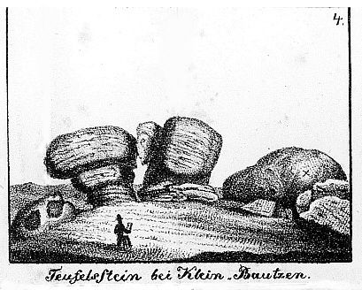 Teufelsstein von Pließkowitz/Klein Bautzen gezeichnet von Karl Benjamin Preusker 1844